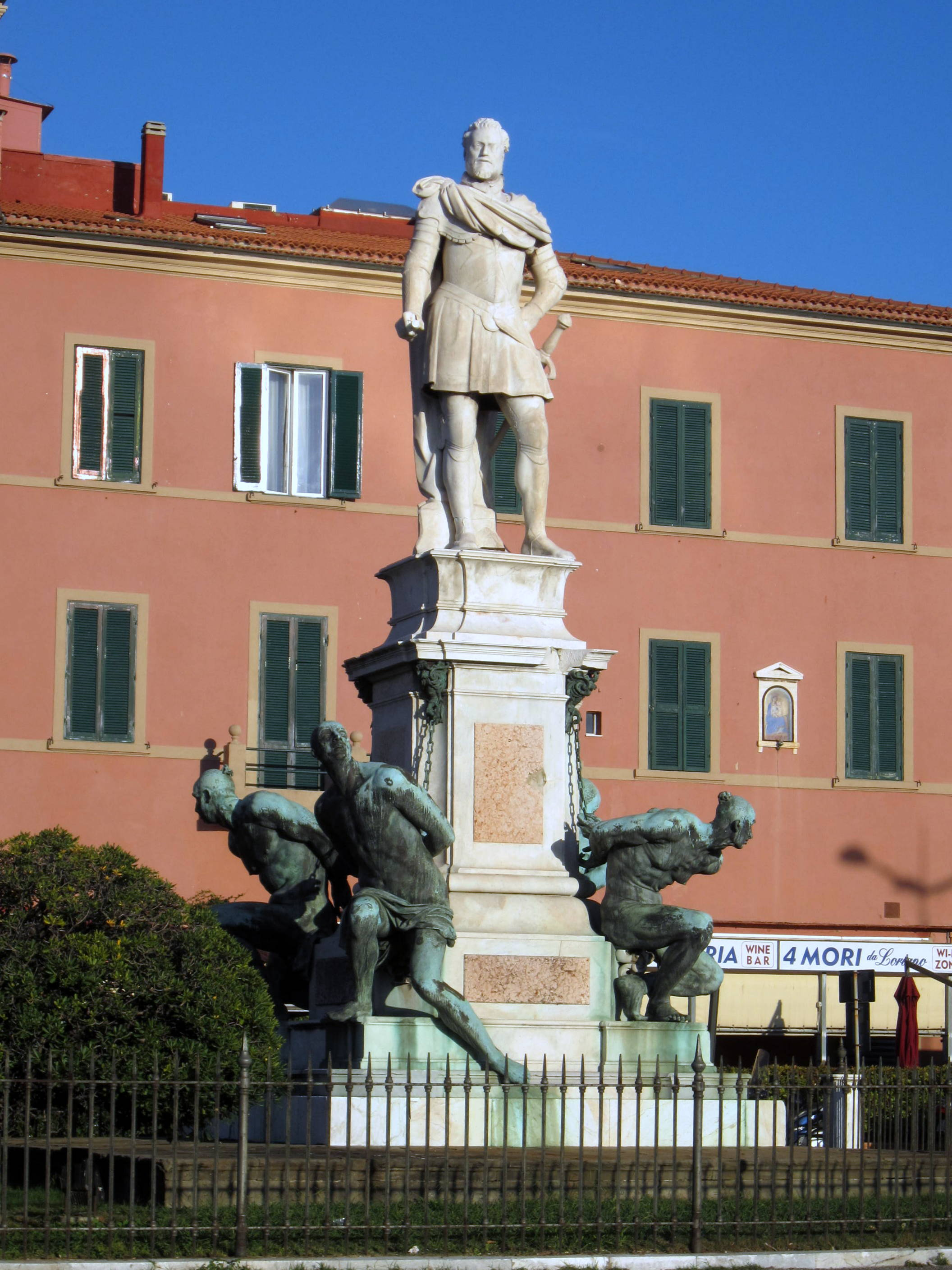 Statua dei Quattro Mori a Livorno